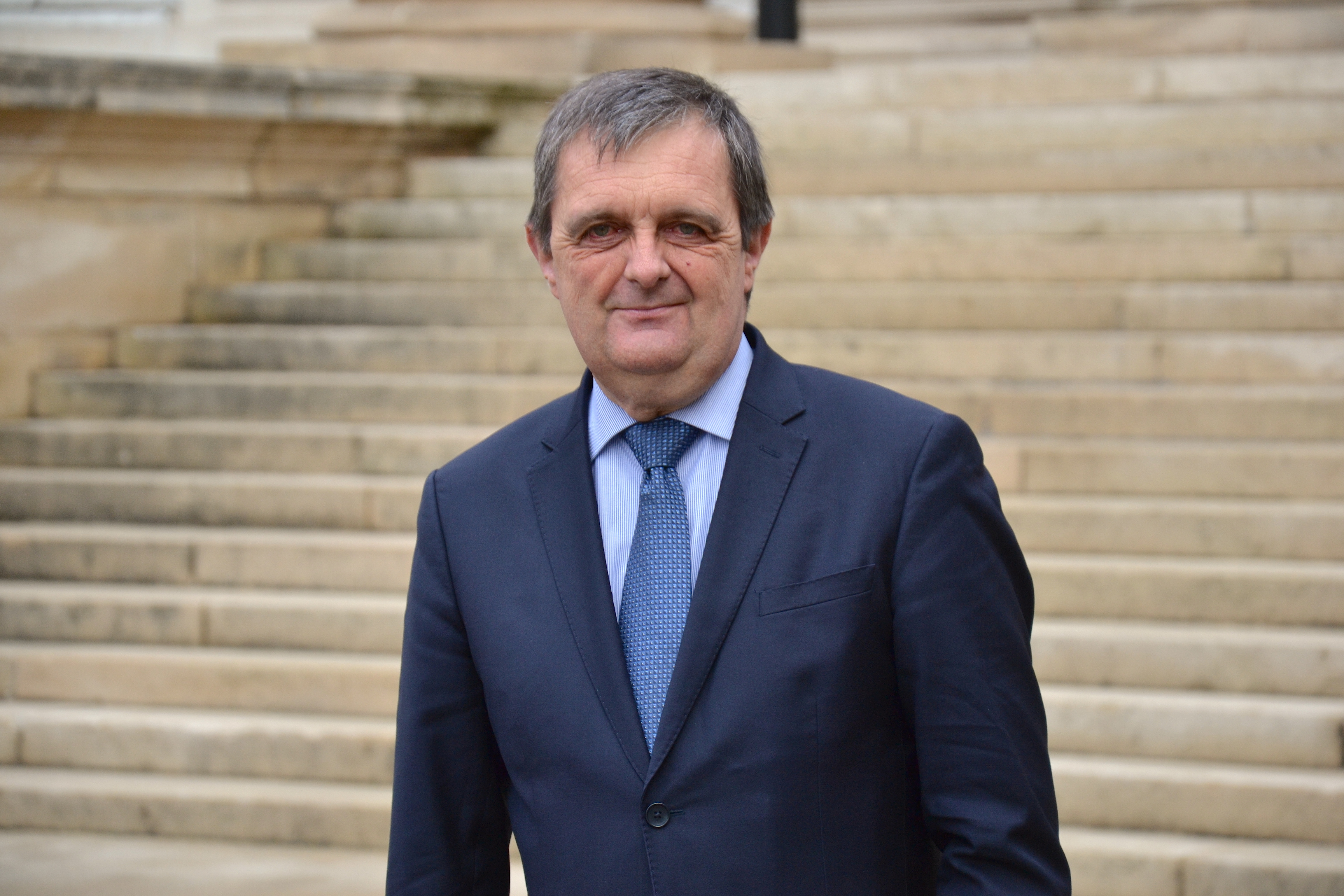 Portrait de Gilles Lurton sur le perron du Palais Bourbon, décembre 2015 par Paul Brounais